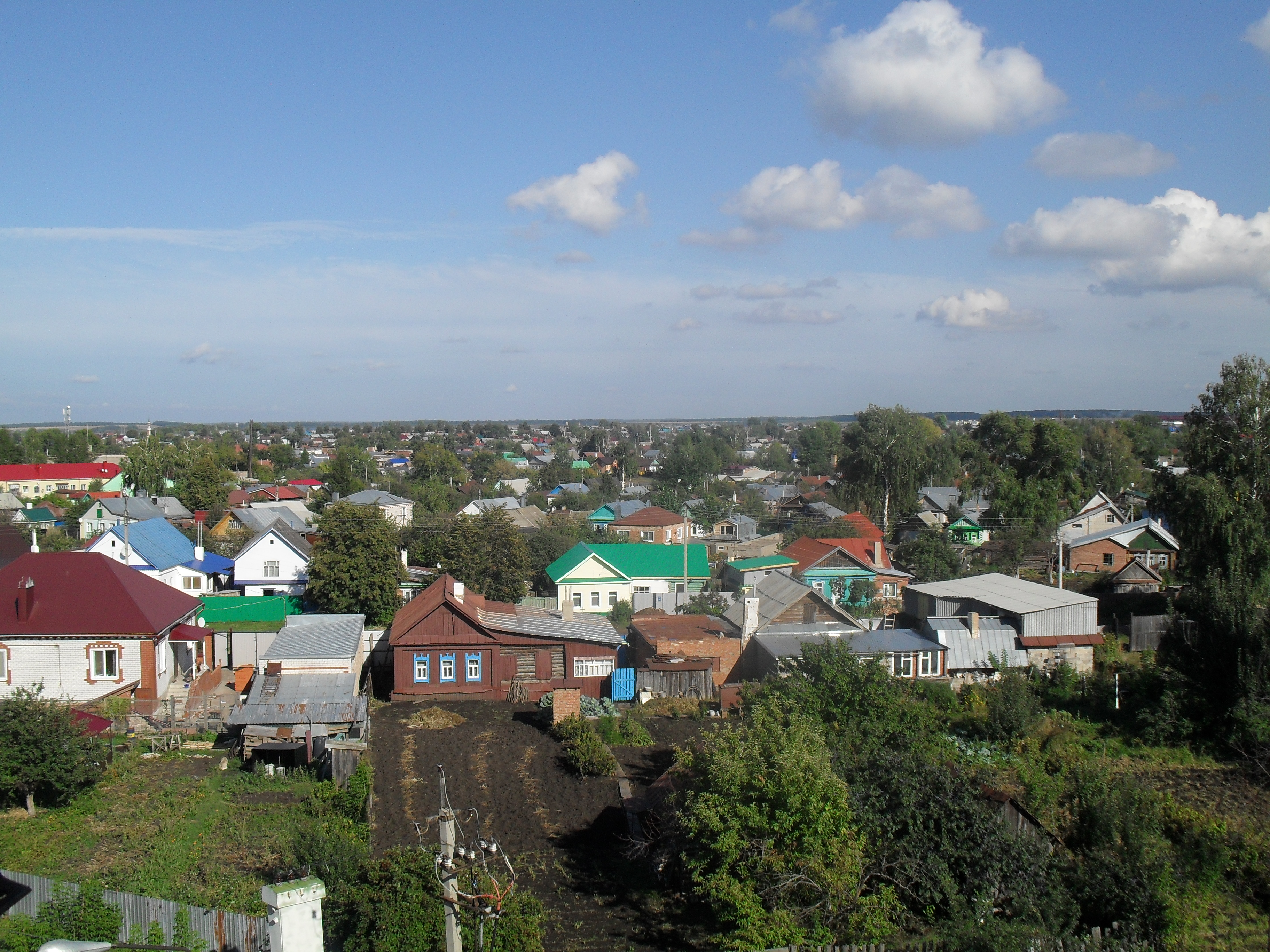 Вид на город Чистополь с пятиэтажки по улице 40 лет Победы